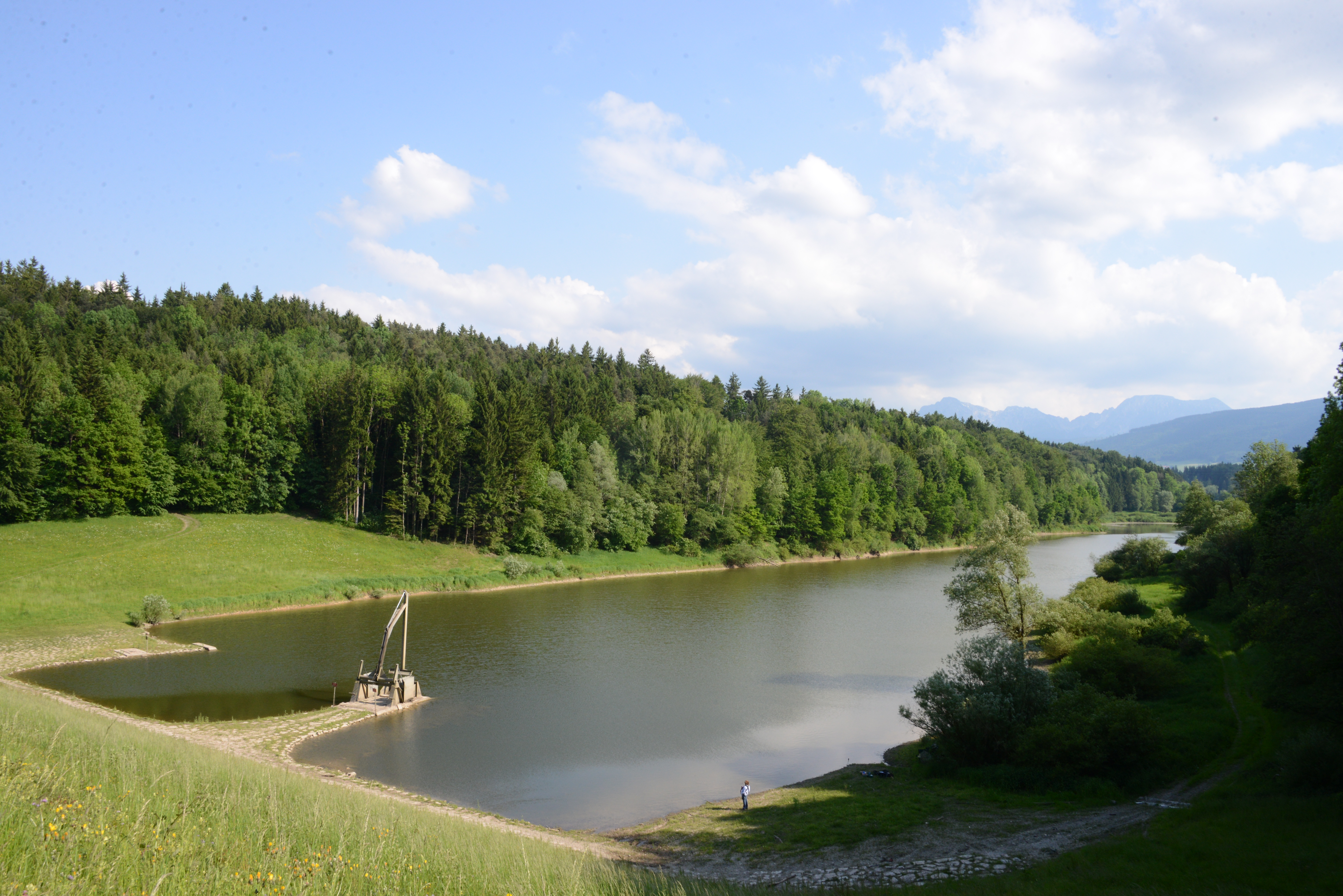 Blick vom Staudamm über den Surspeicher in Richtung Süden. Im Hintergrund ist das Staufenmassiv zu sehen.